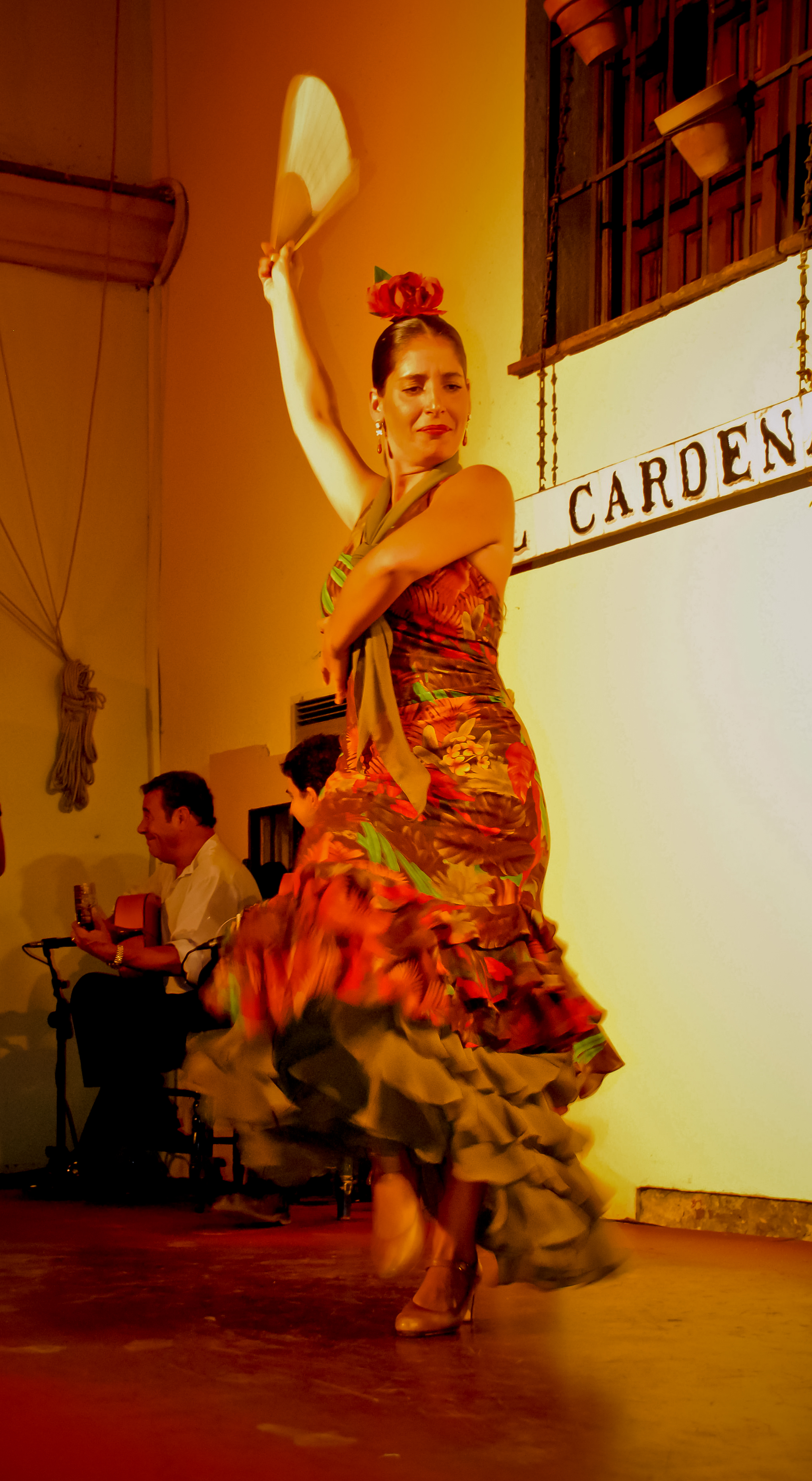 Flamenco en Córdoba (España).